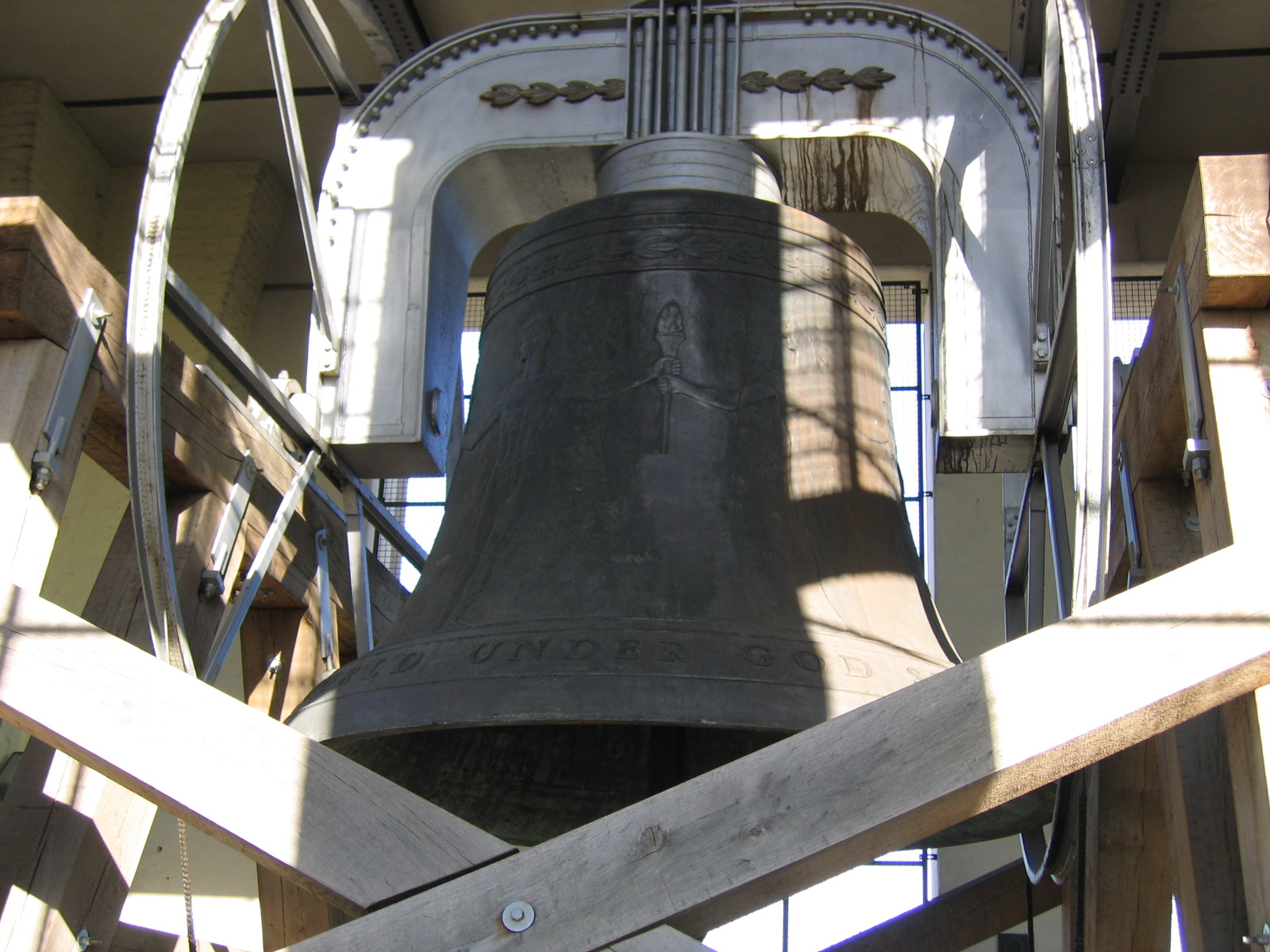 Berliner Freiheitsglocke im Schöneberger Rathaus